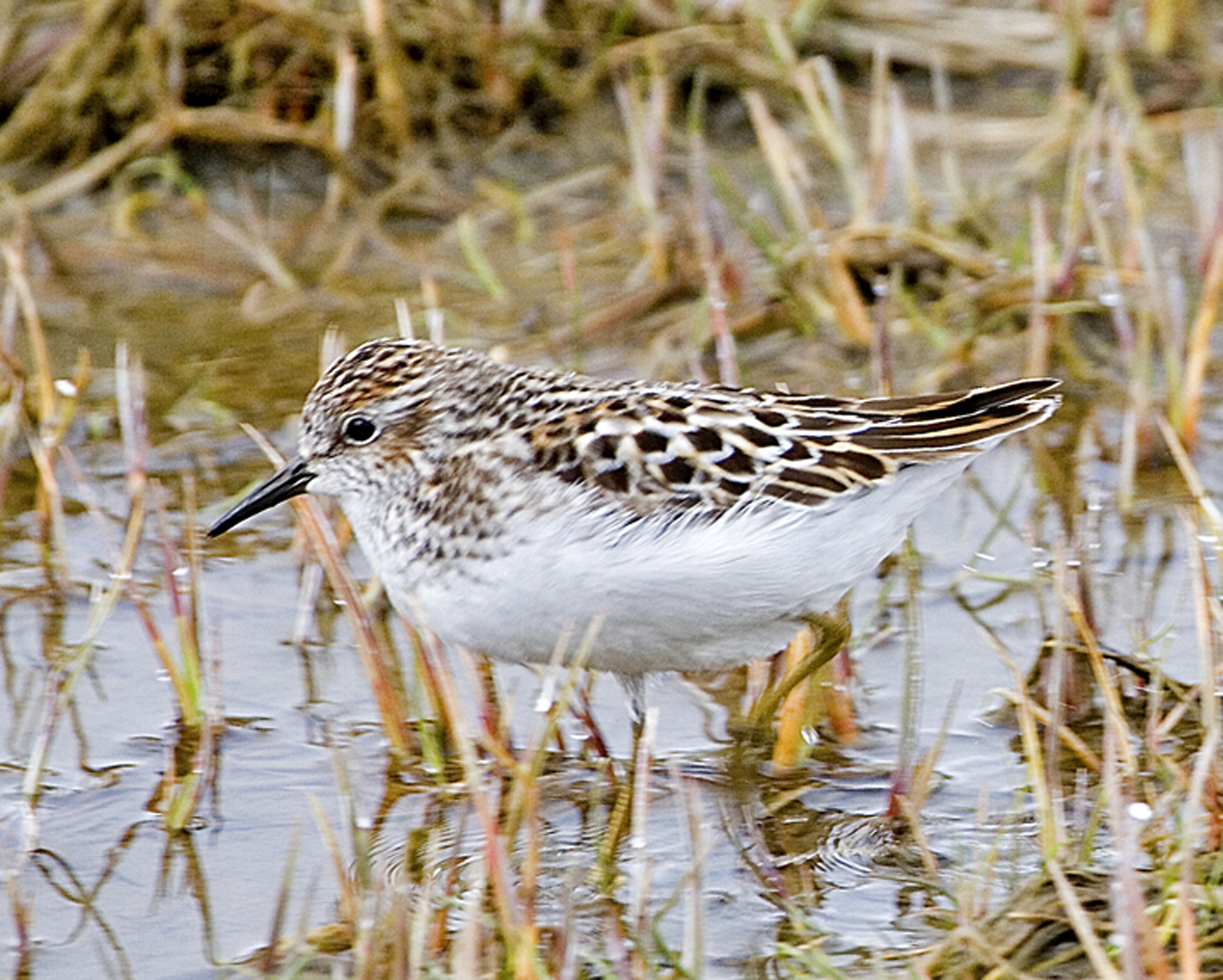 Least Sandpiper (Calidris minutilla)